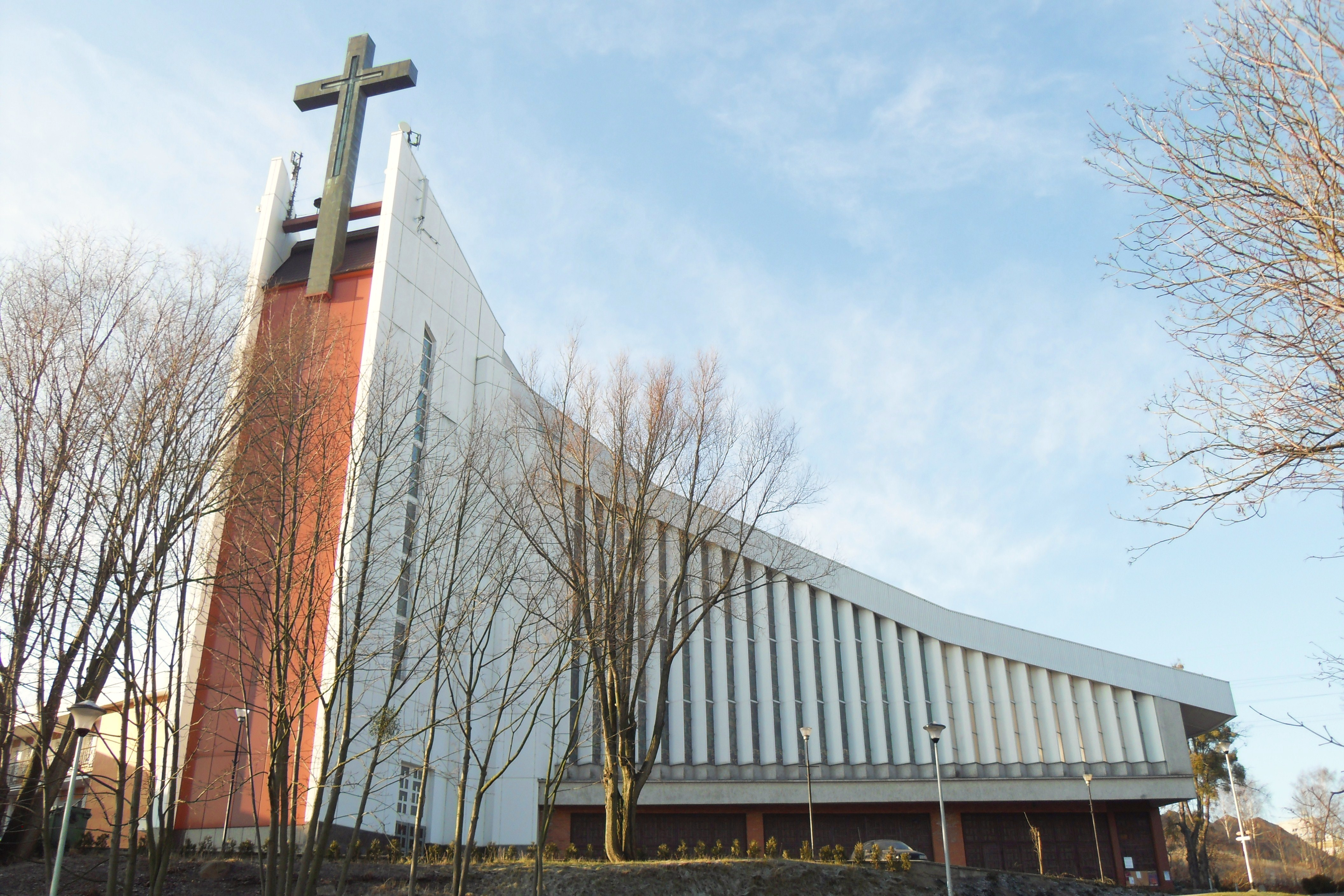 Gdańsk Piecki-Migowo. Kościół Bożego Ciała, ul. Piecewska 9.